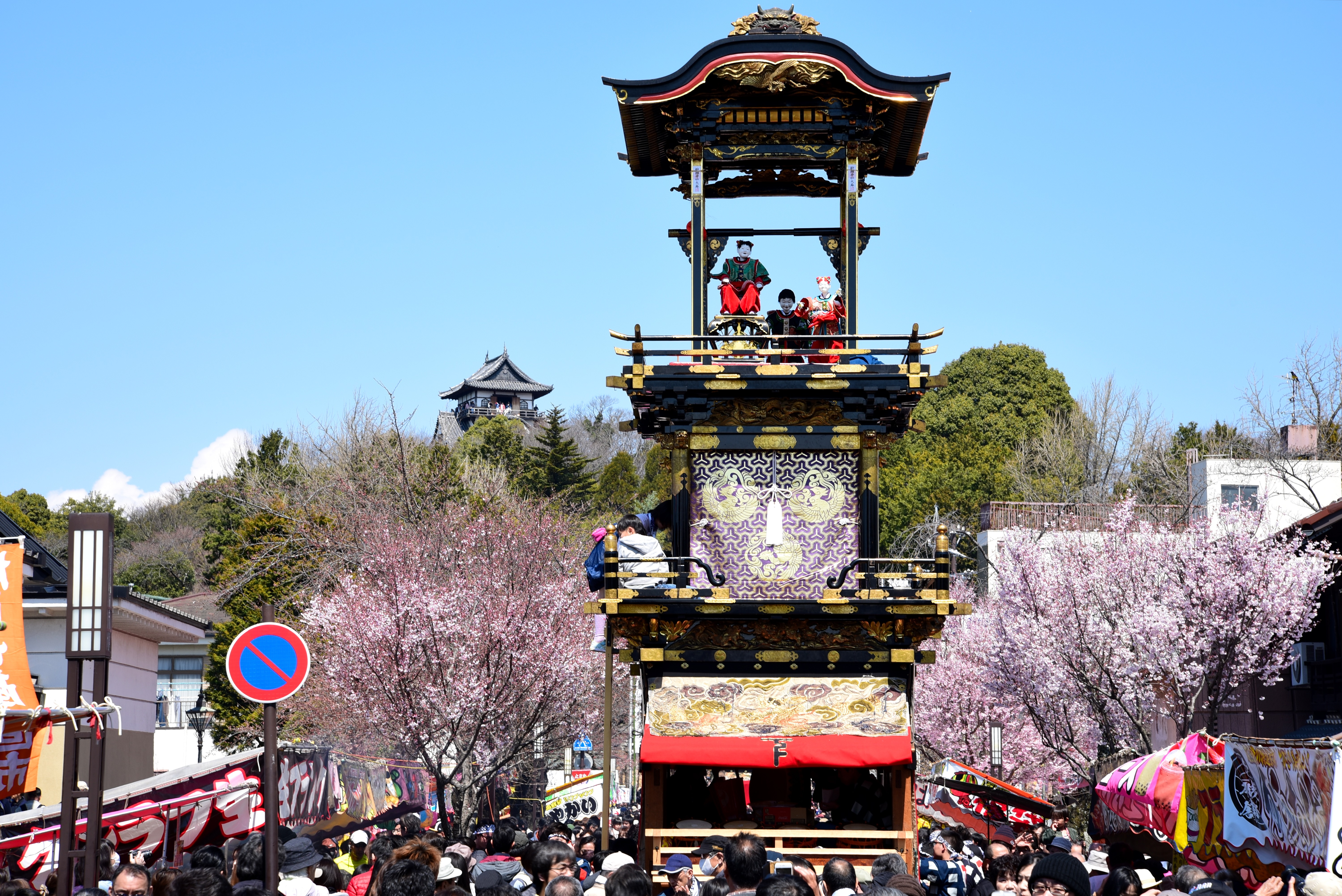 車山と犬山城